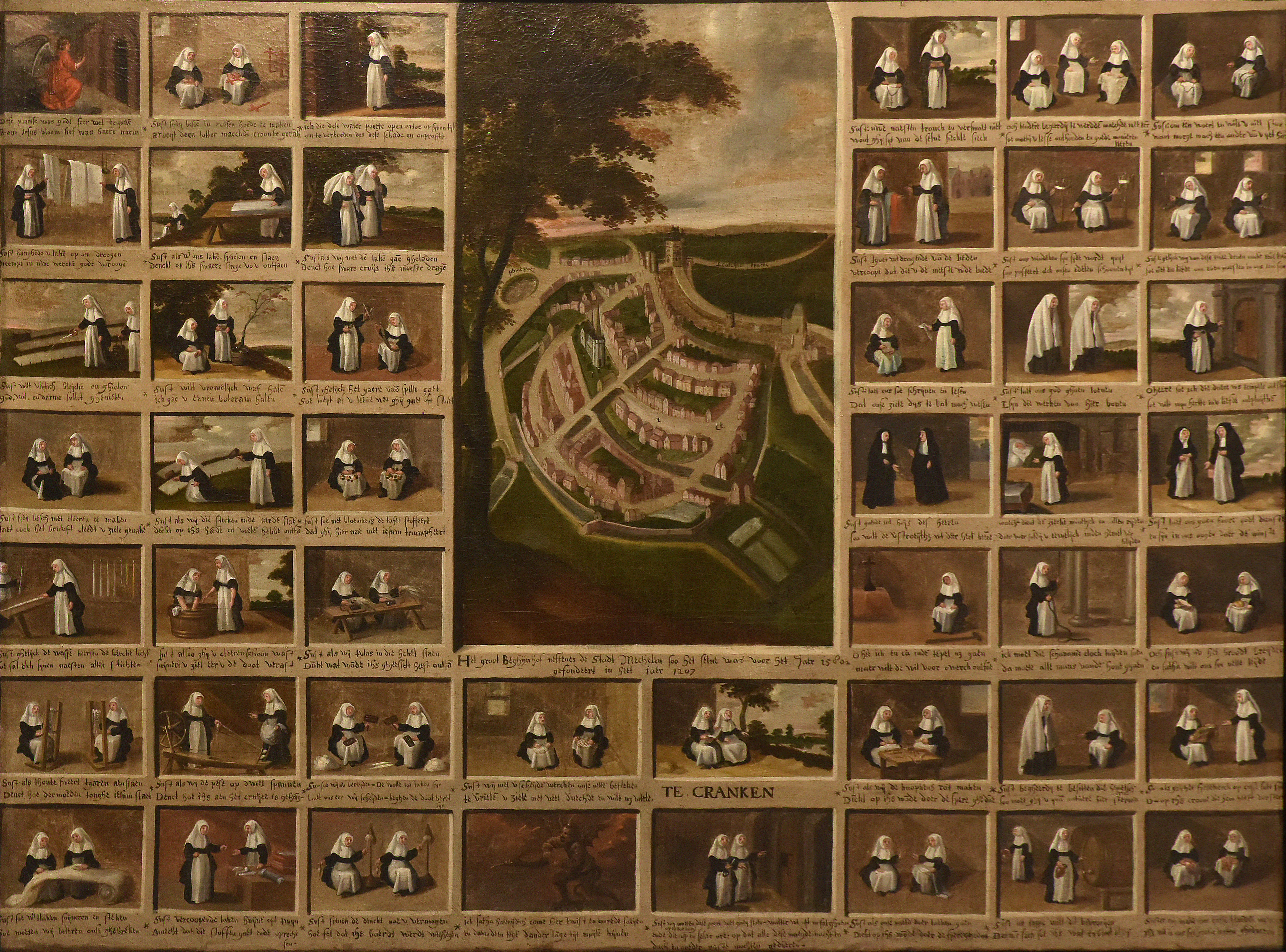 Onbekend - Werkzaamheden van de Mechelse begijnen (1578) - Museum Hof van Busleyden Mechelen This photo of movable heritage has been taken in the Flemish Region